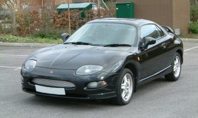 1994 FTO GPX